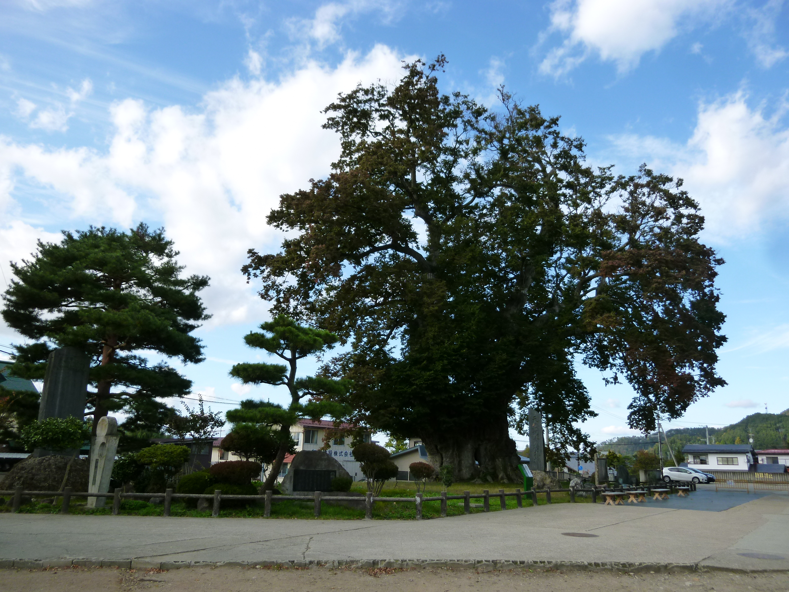 東根の大けやき(2015年10月撮影)